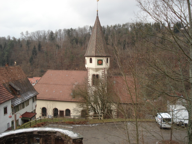 Wildberger Kirche, vom Schloss aus